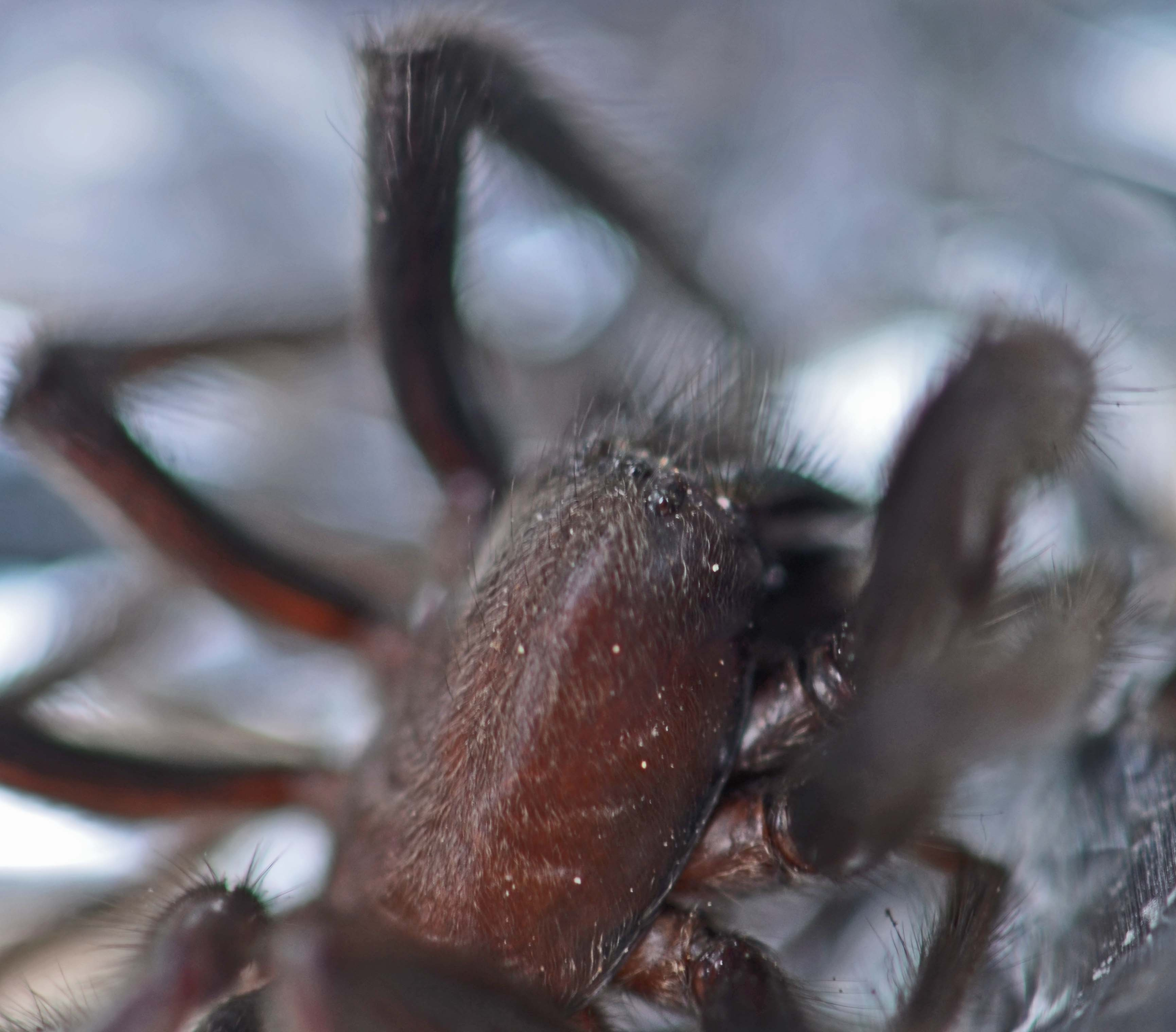 Détail du dos (pilosité) d'un cadavre d'araignée Segestria florentina trouvé à Morgat (Bretagne, France en juillet 2011)